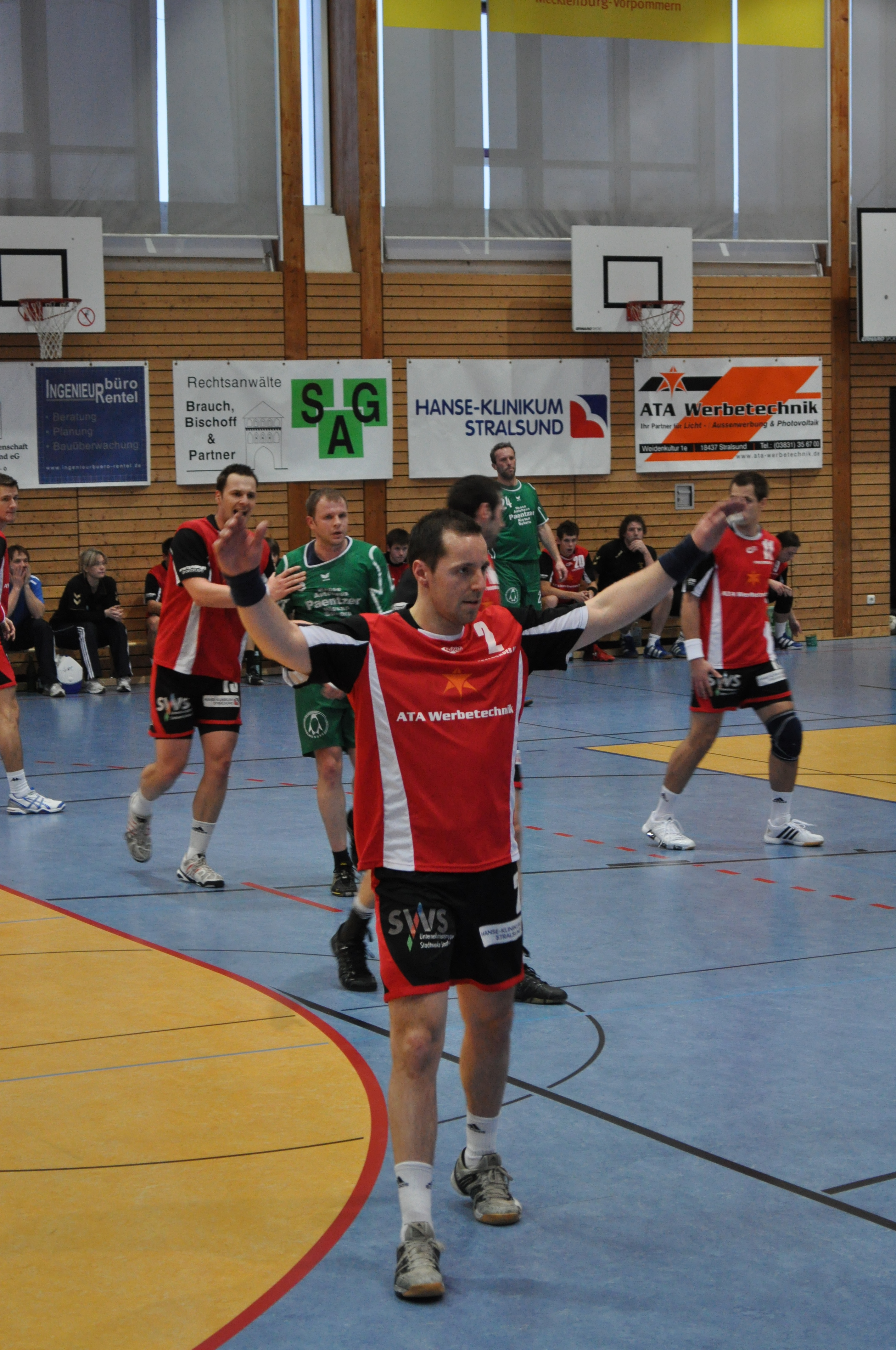 Karsten Ganschow (Nr. 2) vom Stralsunder HV, 1. Männer, 2010-02-07, beim Spiel gegen HSG Uni Greifswald (44:8) in der Stralsunder Diesterweg-Sporthalle